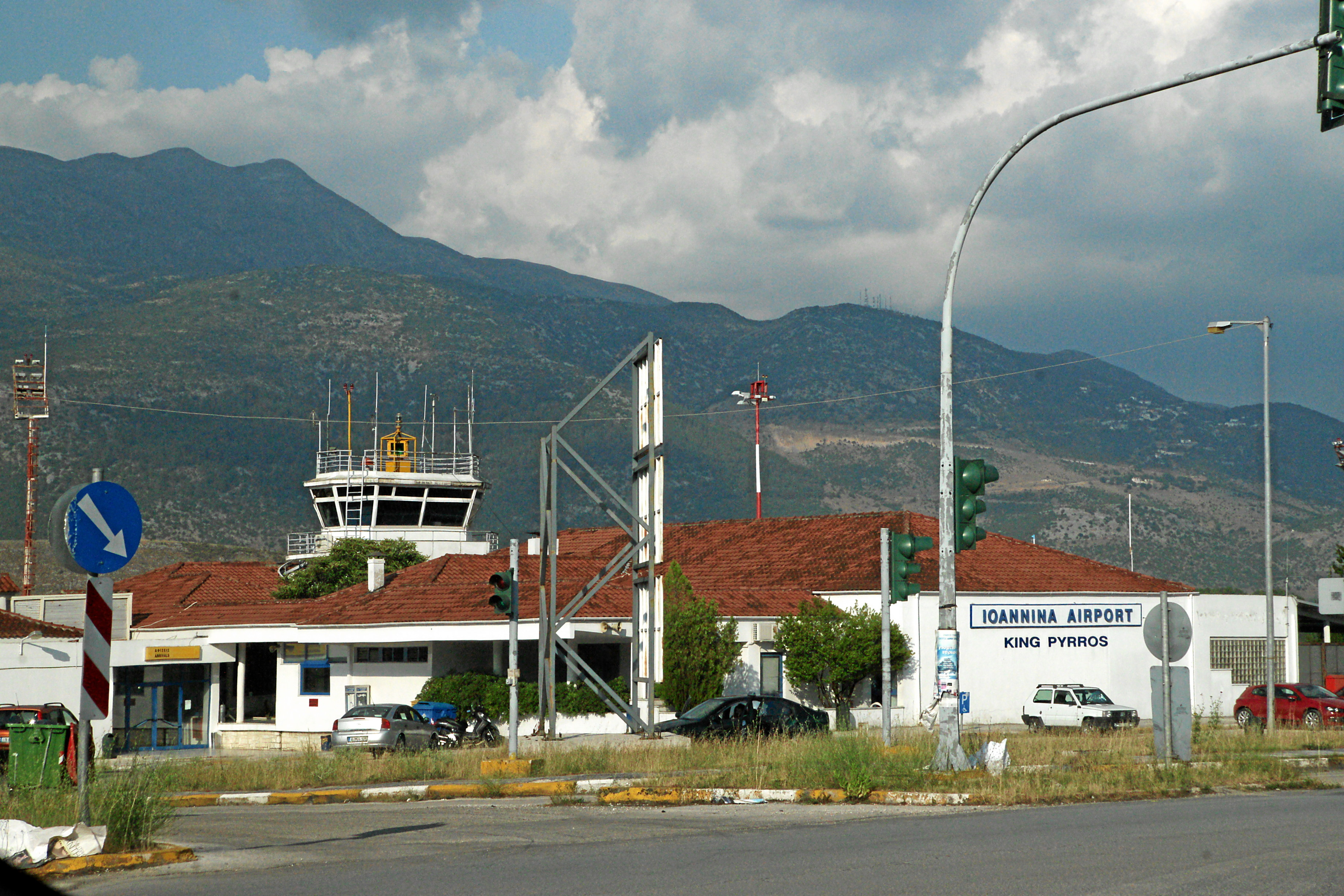 Ioannina Airport "King Pyrros"